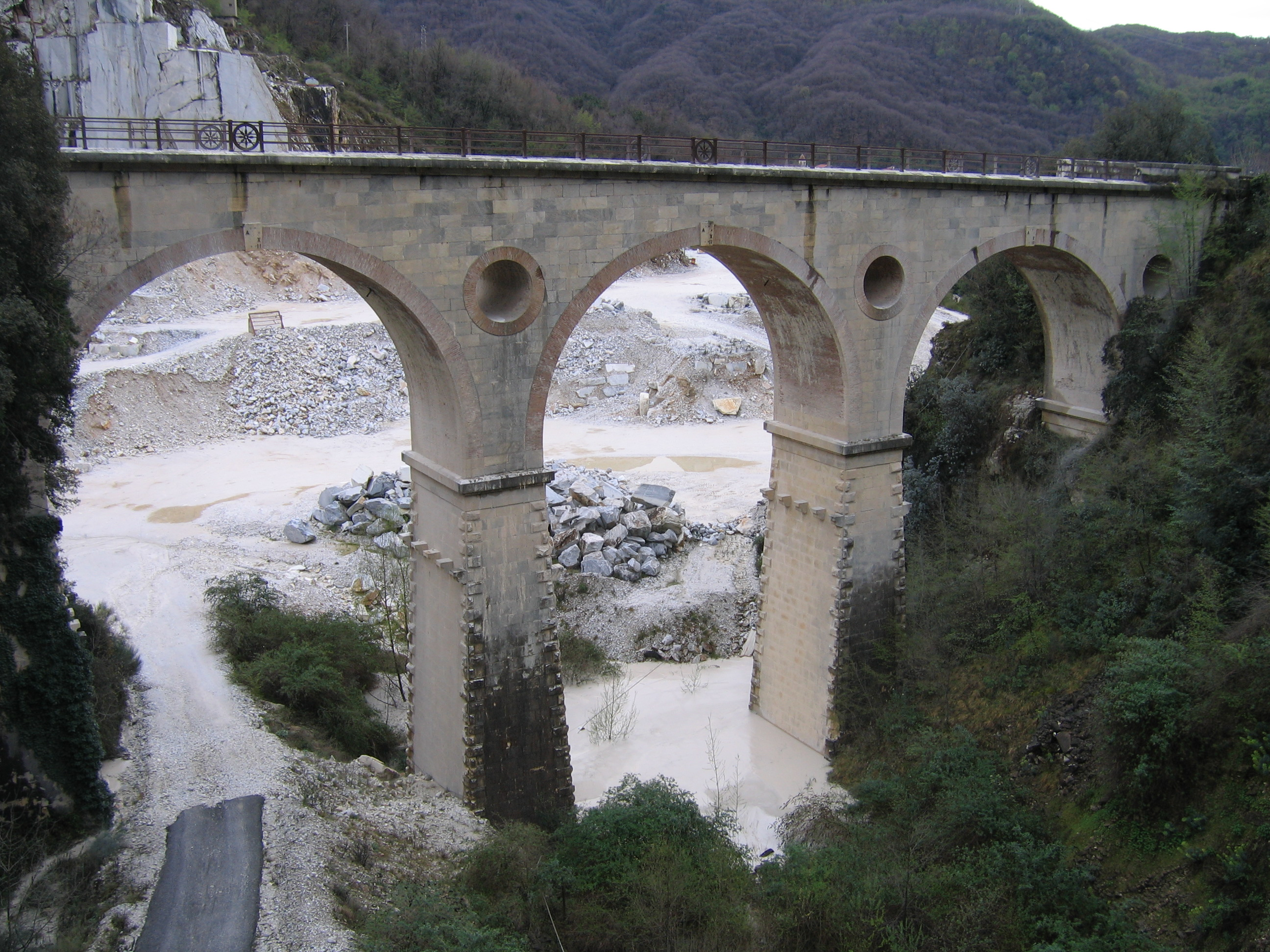 Ponti di Vara della Ferrovia Marmifera di Carrara.